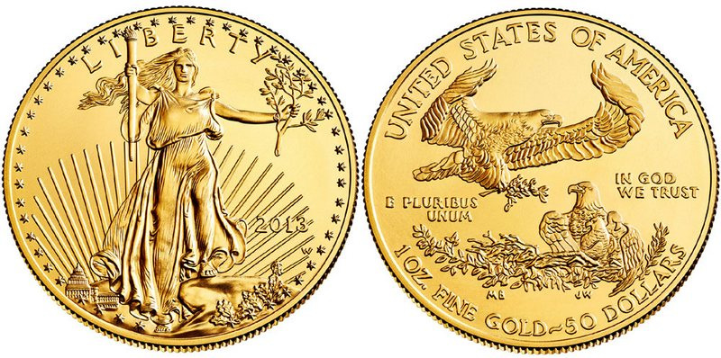 Инвестиционная монета «Американский Золотой Орел»